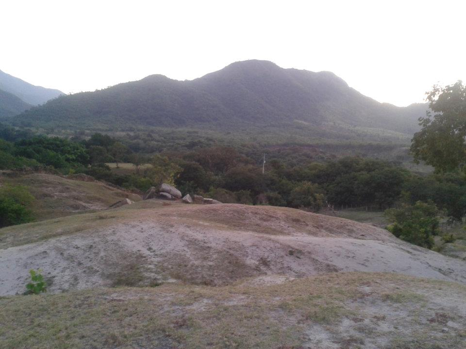 Paisajes del corregimiento de La Mina